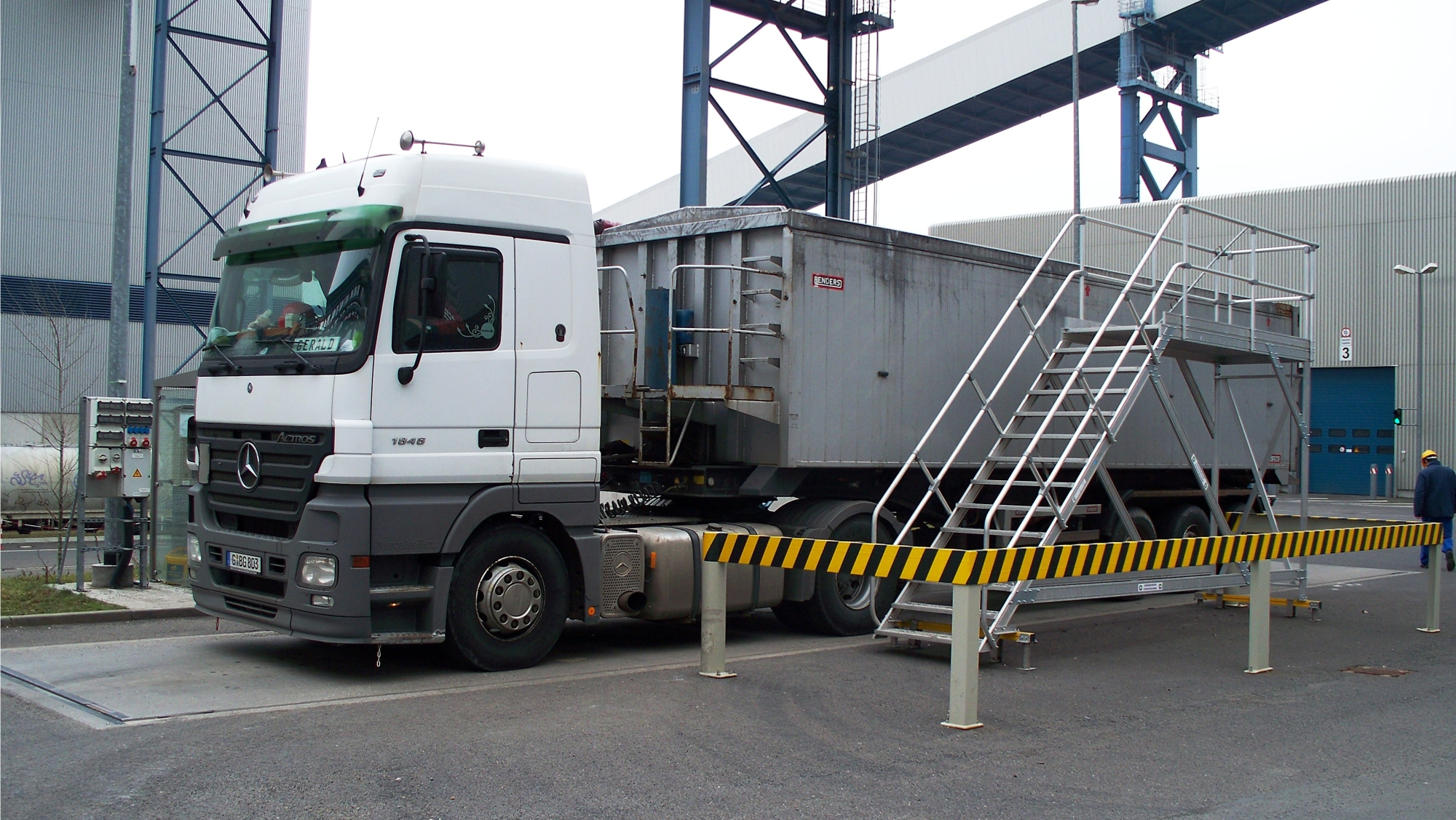 Ein Mercedes-Benz-LKW auf dem Gelände des Braunkohlekraftwerks Lippendorf. Mit LKW wird der Klärschlamm antransportiert, der gemeinsam mit der Braunkohle verbrannt wird.